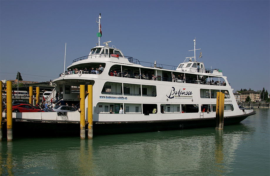 Bodensee-Autofähre Romanshorn - Friedrichshafen